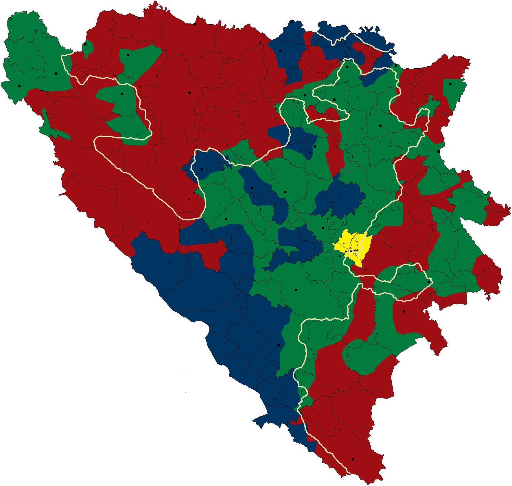 Kasnije prepravke plana Carrington Cuttilero. Izvor